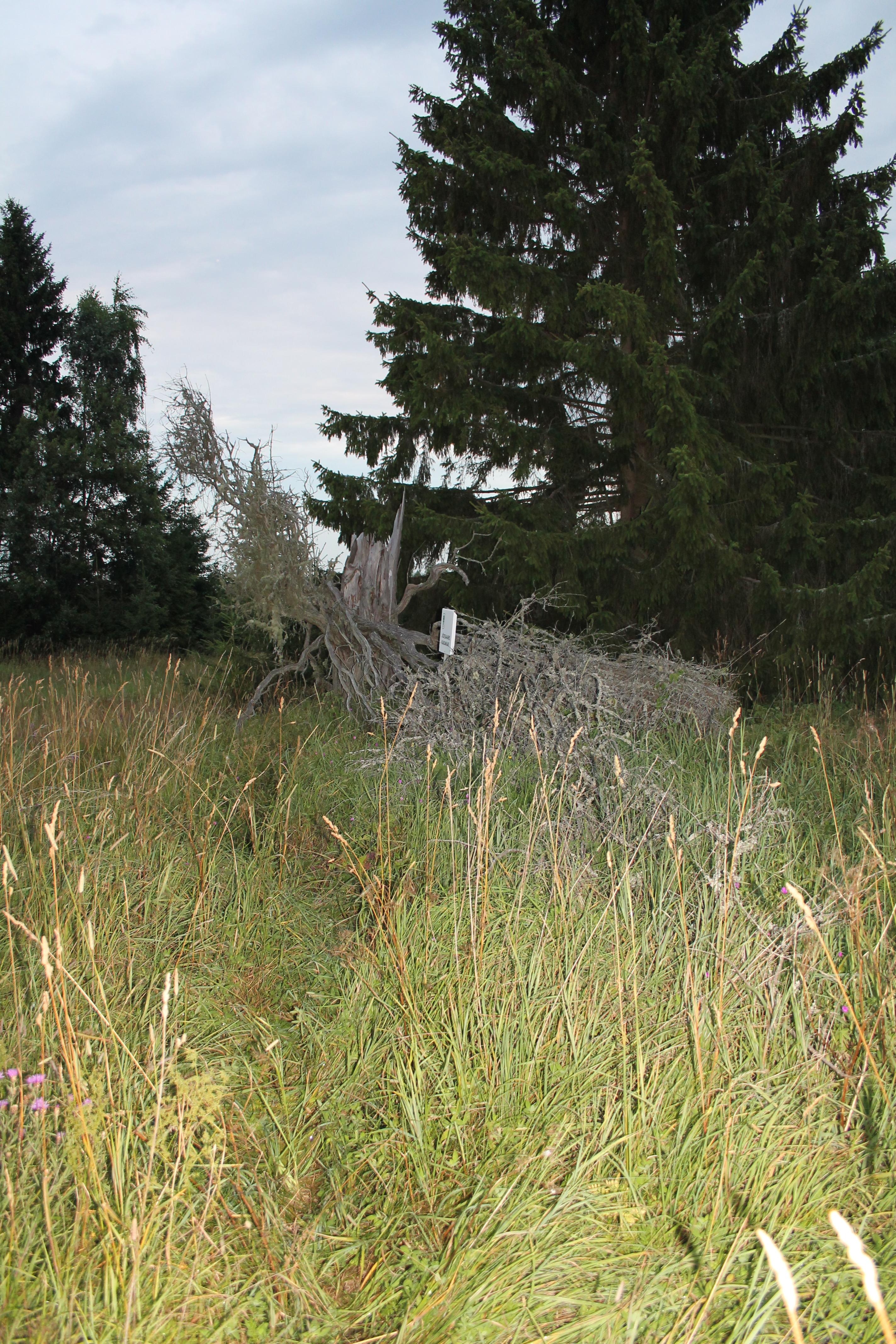 Jõesaare kadakas